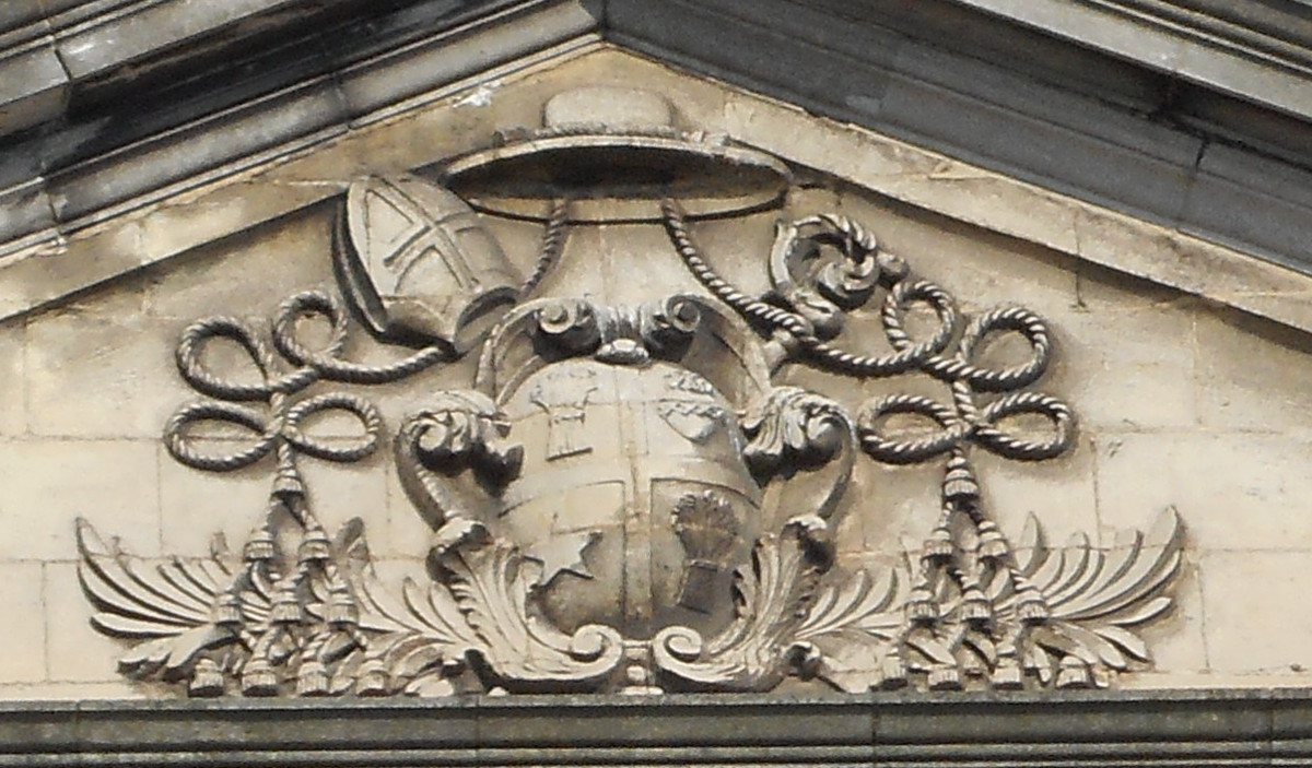 Écu sur le fronton de l'Abbaye de Beaurepart (Grand Séminaire de Liège/Espace Prémontrés) qui fait face au 'Plongeur'. Il s'agit de celui de Louis-Joseph Kerkhofs[1]'[2], il date de 1932.